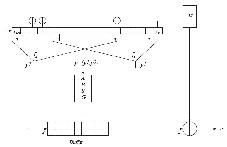 Рис. 1